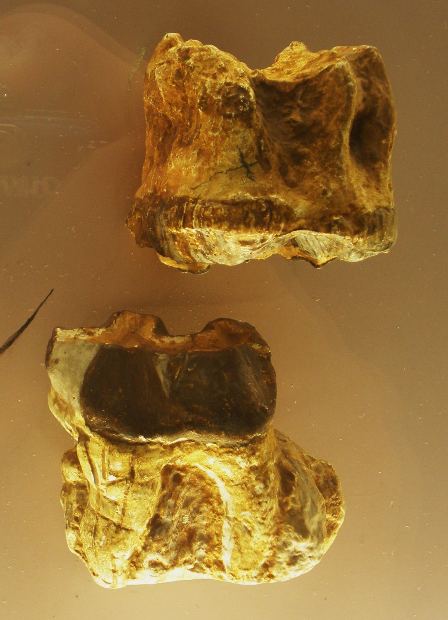 Fossil of Titanohyrax, an extinct mammal -- Took the photo at Natural History Museum, London